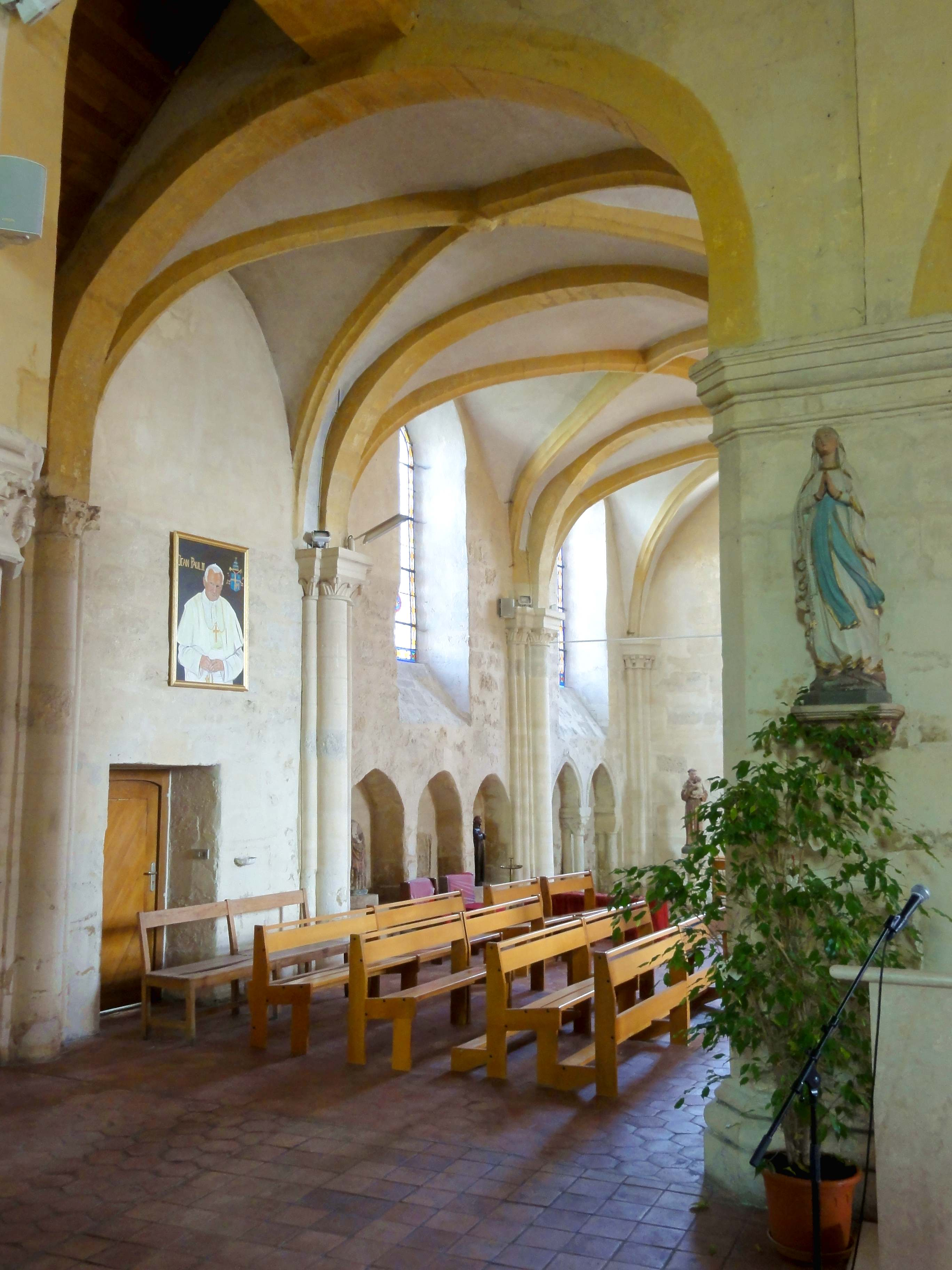 Intérieur de l'église - voir titre.